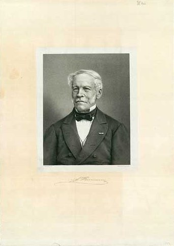 Philip Julius Bornemann (1803-1883)